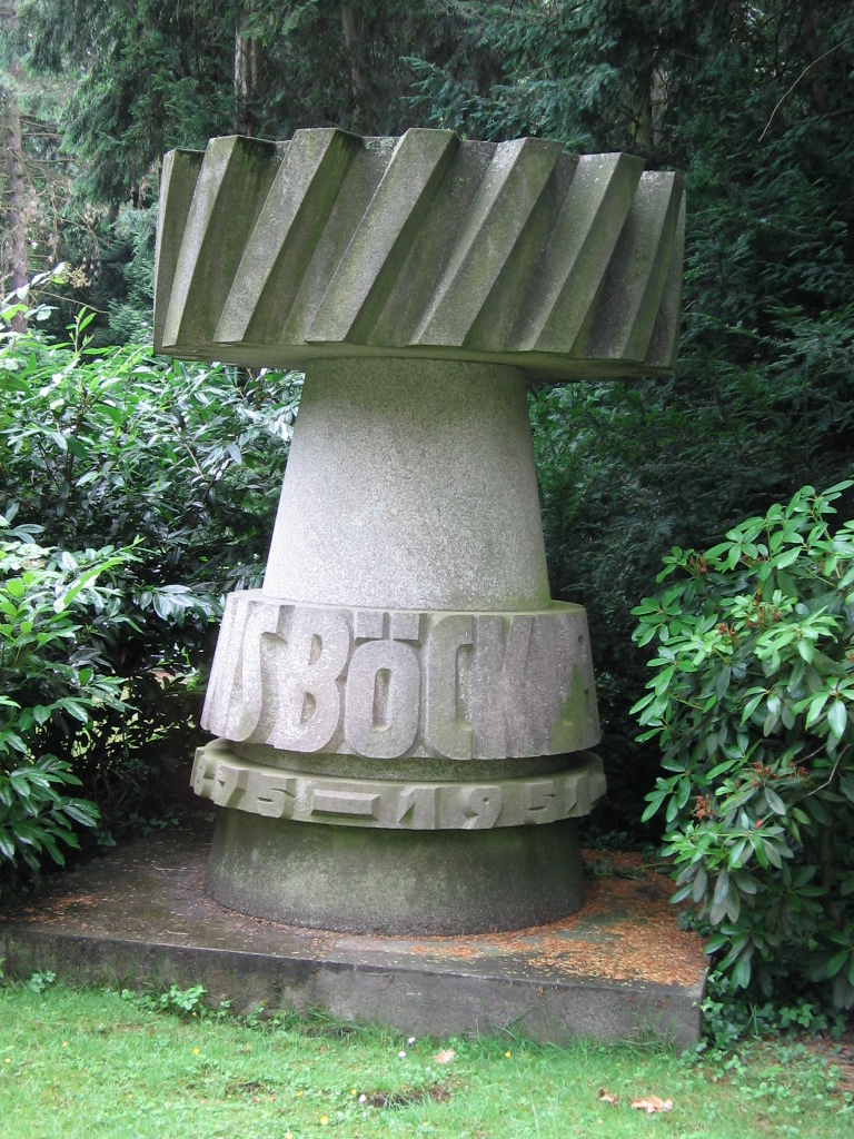 Grabstein für Hans Böckler (Politiker und Gewerkschaftsfunktionär). Der Grabstein wurde von Ludwig Gies geschaffen. Der Grabstein zeigt das Gewerkschaftssymbol des Zahnrades nach dem Motto ("alle Räder stehen still, wenn dein starker Arm es will')